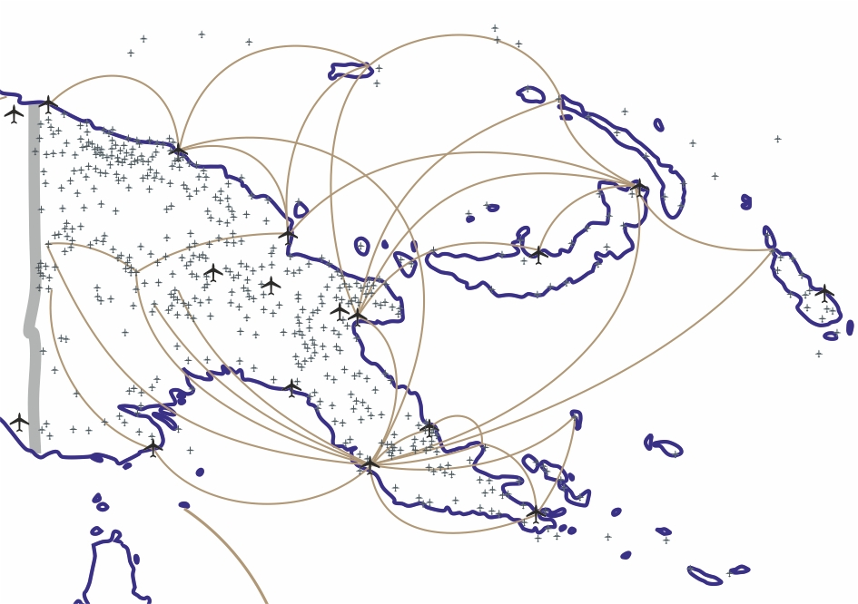 Аэропорты и местные аэродромы Папуа-Новой Гвинеи. Линиями показаны маршруты Air Niugini, Airlink, Airlines PNG. Источник: Литвинов Н. Н. Стратегический менеджмент на примере Азиатско-Тихоокеанского региона. Монография. — М., 2010. — 200 [10] с. — (Strategic Management in the Asian-Pacific) — ISBN 978-5-91252-029-7 для статьи "Экономика Папуа — Новой Гвинеи"